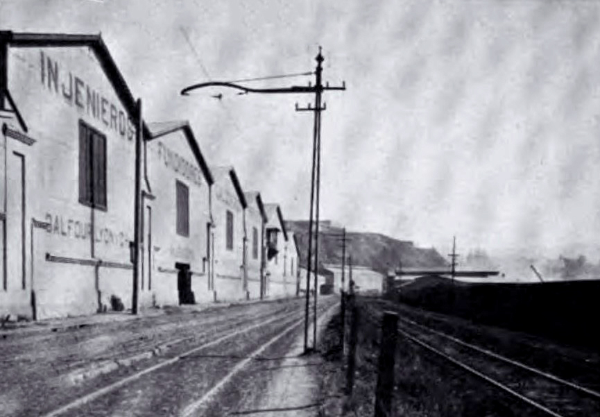 Maestranza en Los Sauces, hoy Caleta Portales, de la firma Balfour, Lyon y Cía.